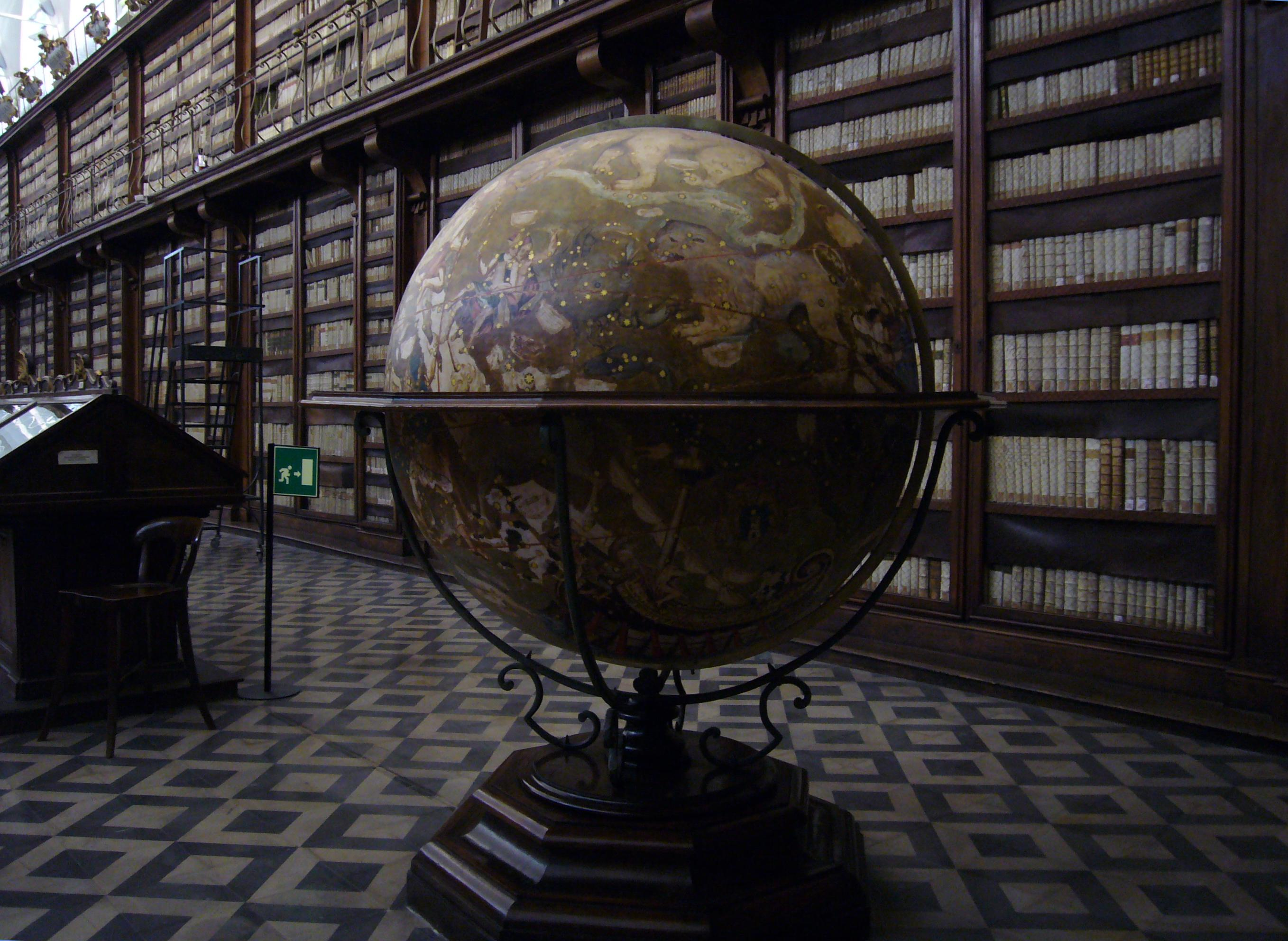 Roma, Biblioteca Casanatense: Sfera celeste